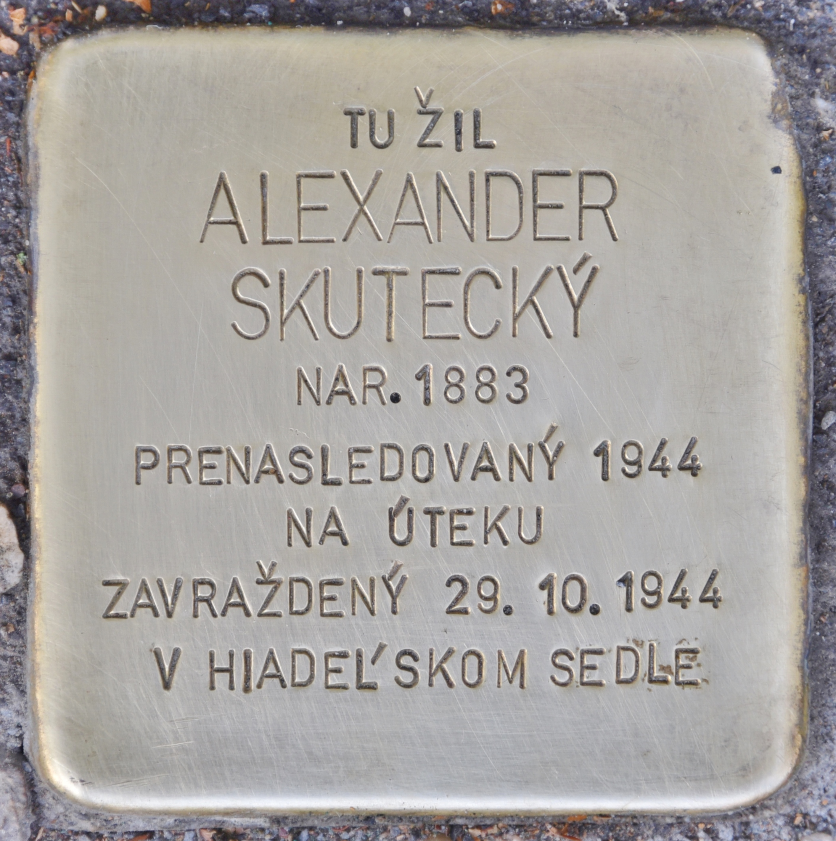 Stolperstein für Alexander Skutecky